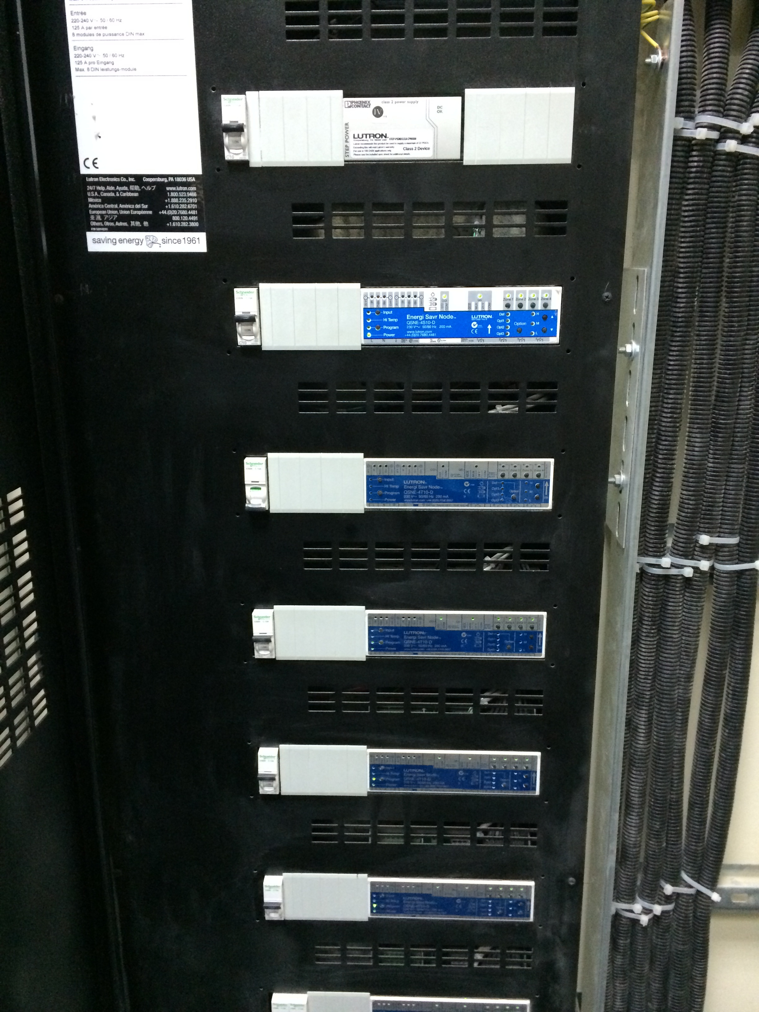 DIN щит в сборе